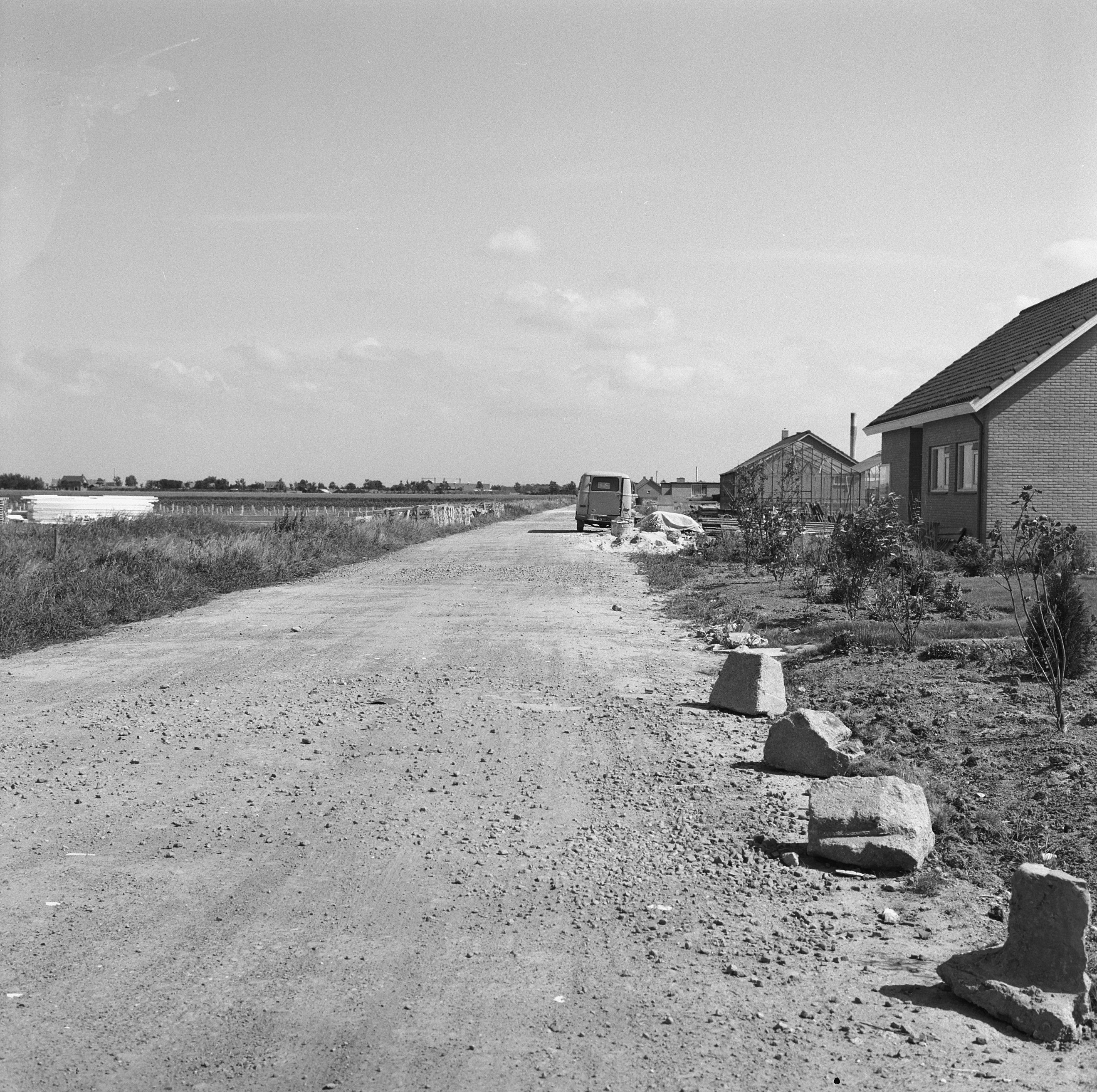 Collectie / Archief : Fotocollectie Nederlandse Heidemaatschappij Reportage / Serie : [ onbekend ] Beschrijving : aanleg en verbeteren van wegen, dijken en spaarbekken, tuinbouwcomplexen, huizen, puinfunderingen, tuinderslag, de blaaker Datum : 1965 Locatie : De Lier Trefwoorden : aanleg en verbeteren van wegen, dijken en spaarbekken, huizen, puinfunderingen, tuinbouwcomplexen Persoonsnaam : de blaaker, tuinderslag Fotograaf : [onbekend] Auteursrechthebbende : Nationaal Archief Materiaalsoort : Negatief (zwart/wit) Nummer archiefinventaris : bekijk toegang 2.24.06.02 Bestanddeelnummer : 161-1386